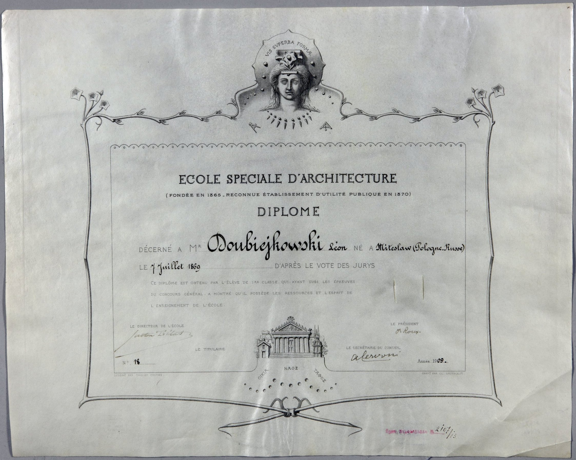 Выдадзены Лявону Вітану–Дубейкаўскаму дыплом пад нумарам 18 Акадэміі архітэктуры ў Парыжы, збор Нацыянальнага гістарычнага музея Рэспублікі Беларусь